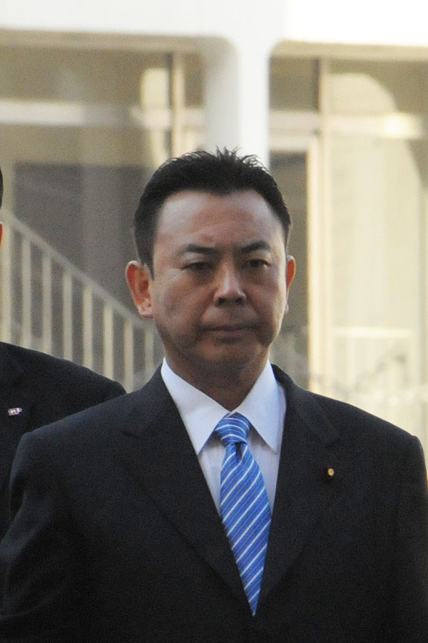 高木陽介衆院議員、新宿西口での街頭演説。